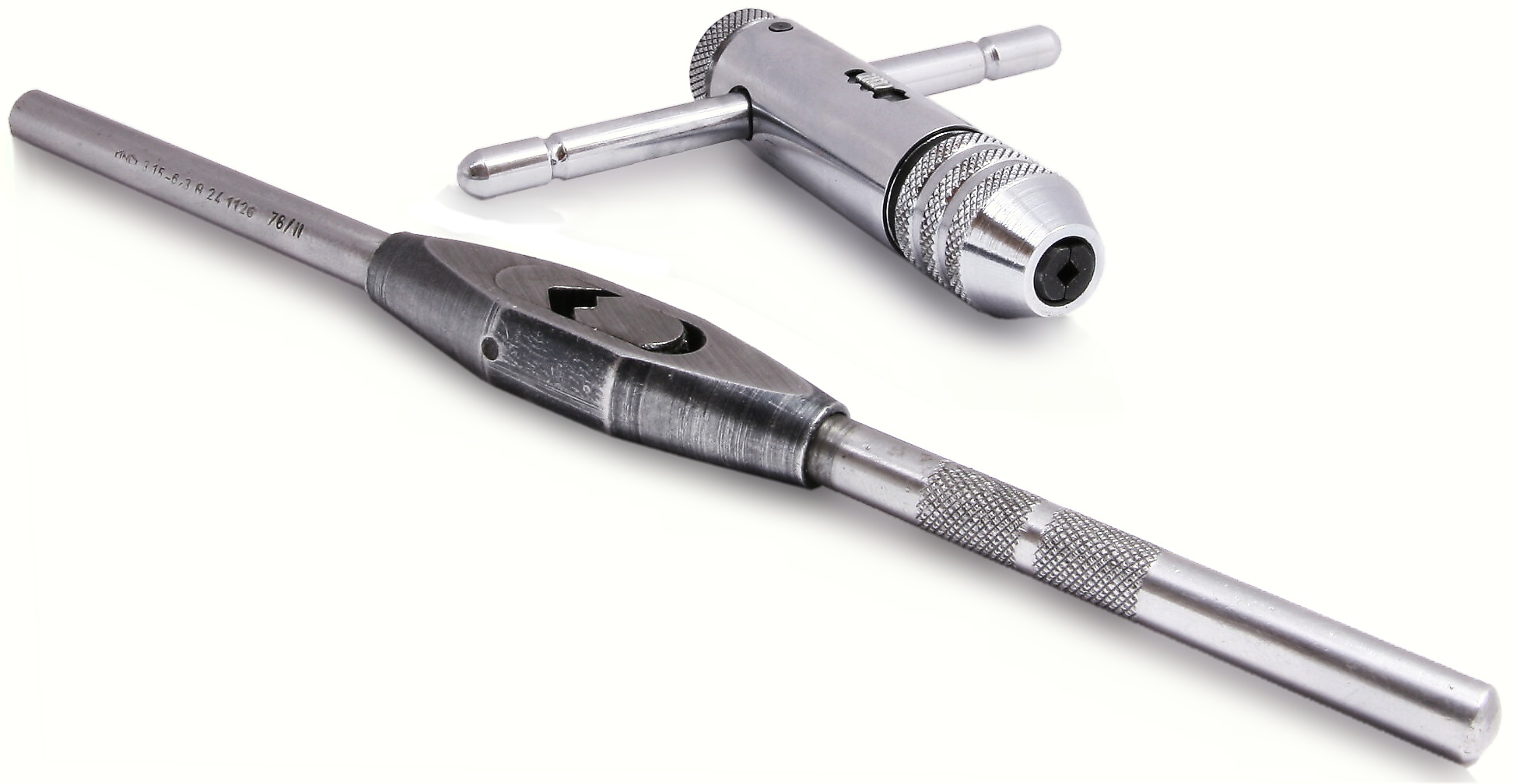 vratidlo